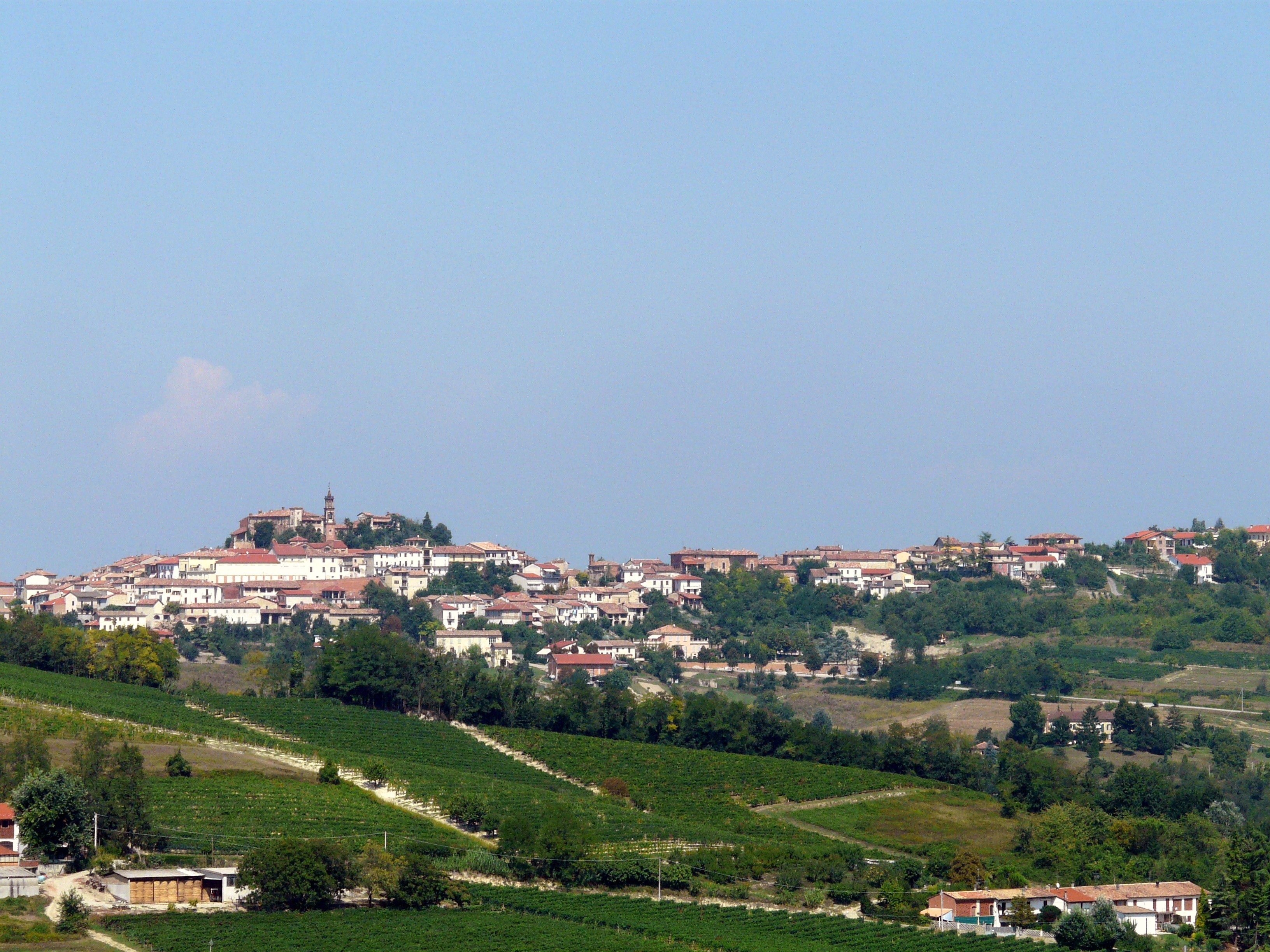 Panorama di Frassinello Monferrato, Piemonte, Italia